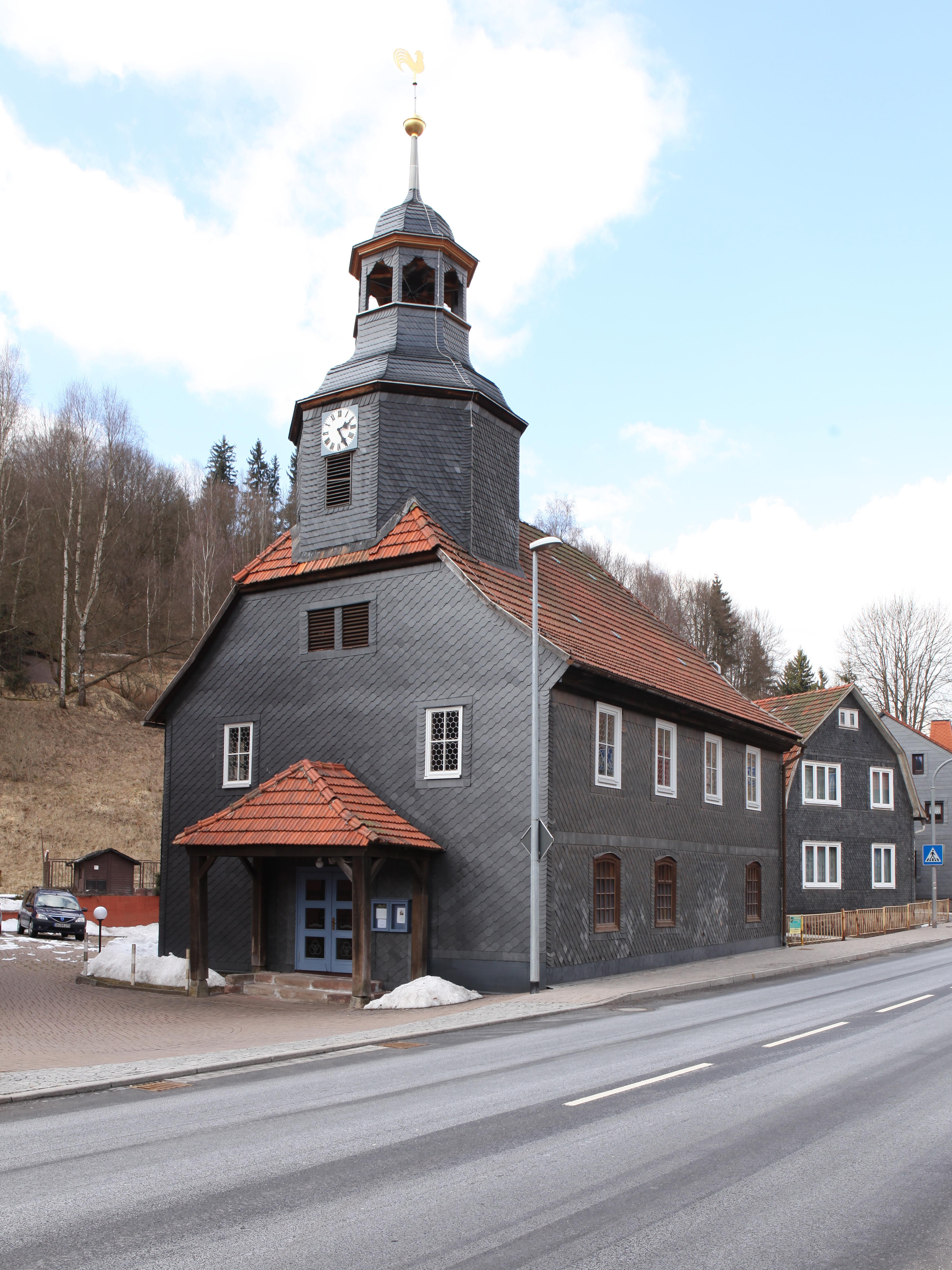 Evangelisch-Lutherische Kirche in Hirschbach, Ot von St. Kilian, Landkreis Hildburghausen